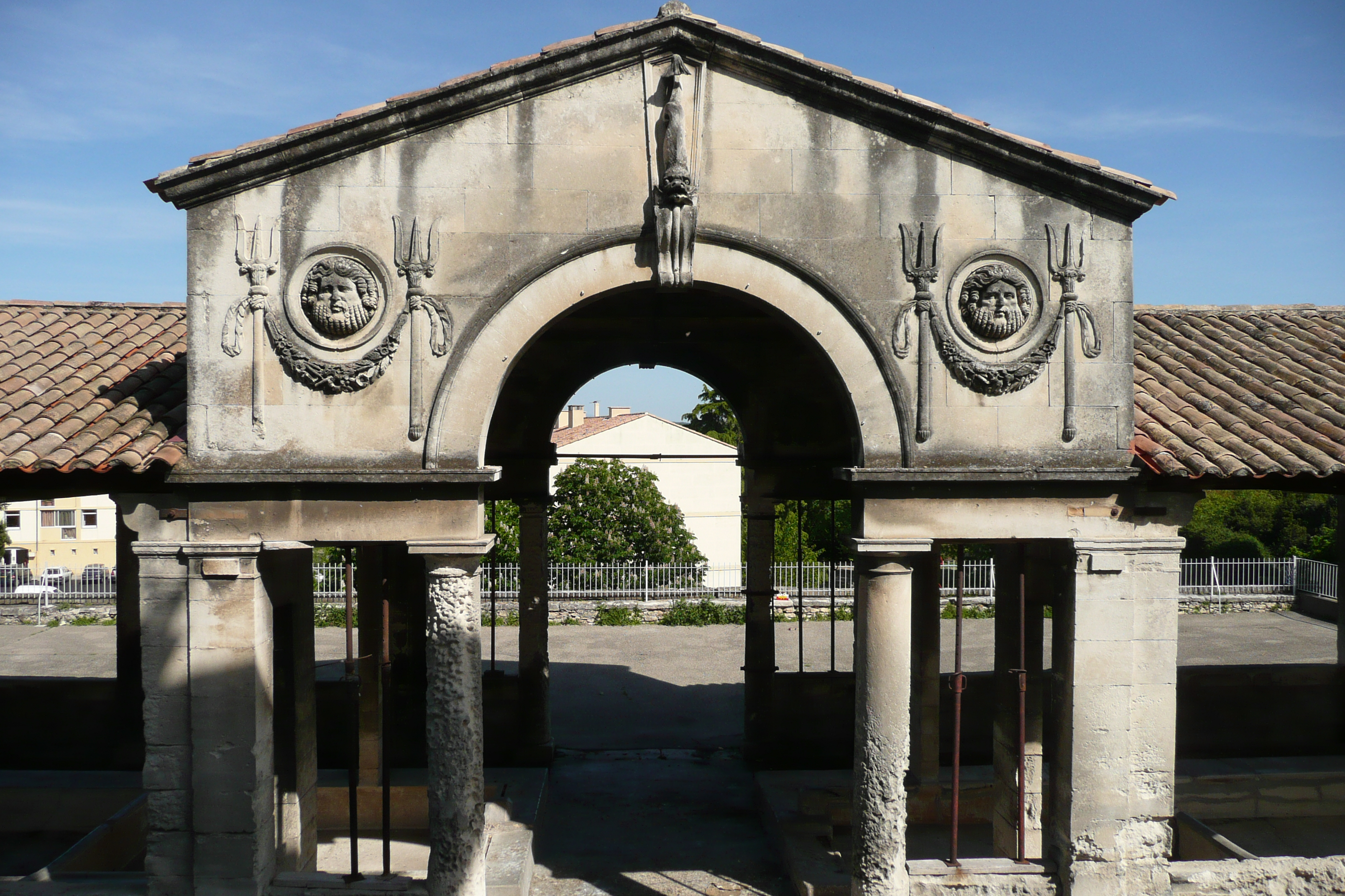 Entrée du lavoir à Pont-Saint-Esprit.